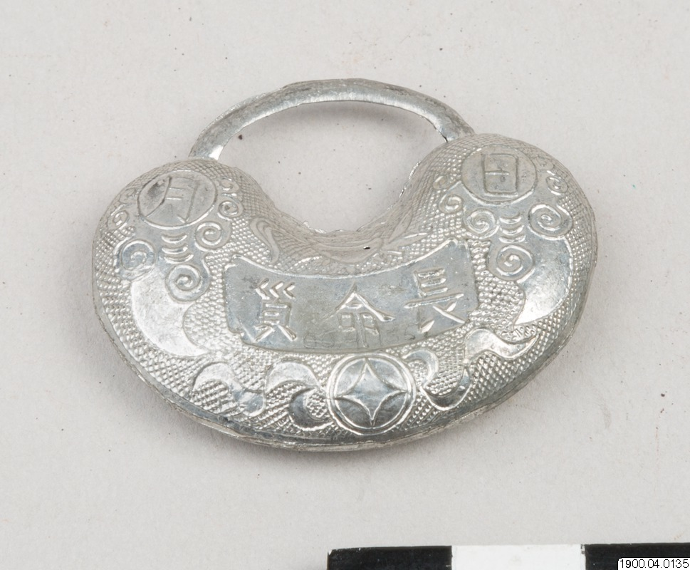 1900.04.0135 Amulett av tenn, " långt livs-låset". Kina [ocr] China Njurformad ihålig dekoration av vit metall, med kinesiska tecken på fram- och baksida. Fylld med någonting så att den skallrar när den skakas. Enligt kataloguppgift en amulett av tenn, ett s.k. "långt livs-lås". Samlingsbesök.Tenn i Kina. 2018-03-27.